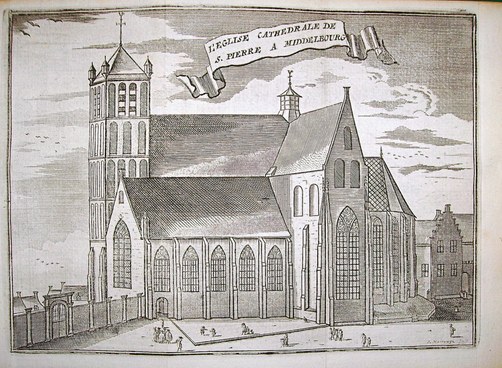 Drawing of Saint Peterschurch in Middelburg. Remarkable is that Christijn entitles the church as cathedral, while at the time the drawing was made it has been protestant for over a century. Kopergravure van de Sint-Pieterskerk (of Noordmonsterkerk) te Middelburg. Opvallend is dat Christijn spreekt over de kathedraal terwijl de kerk dan al meer dan een eeuw protestants is.